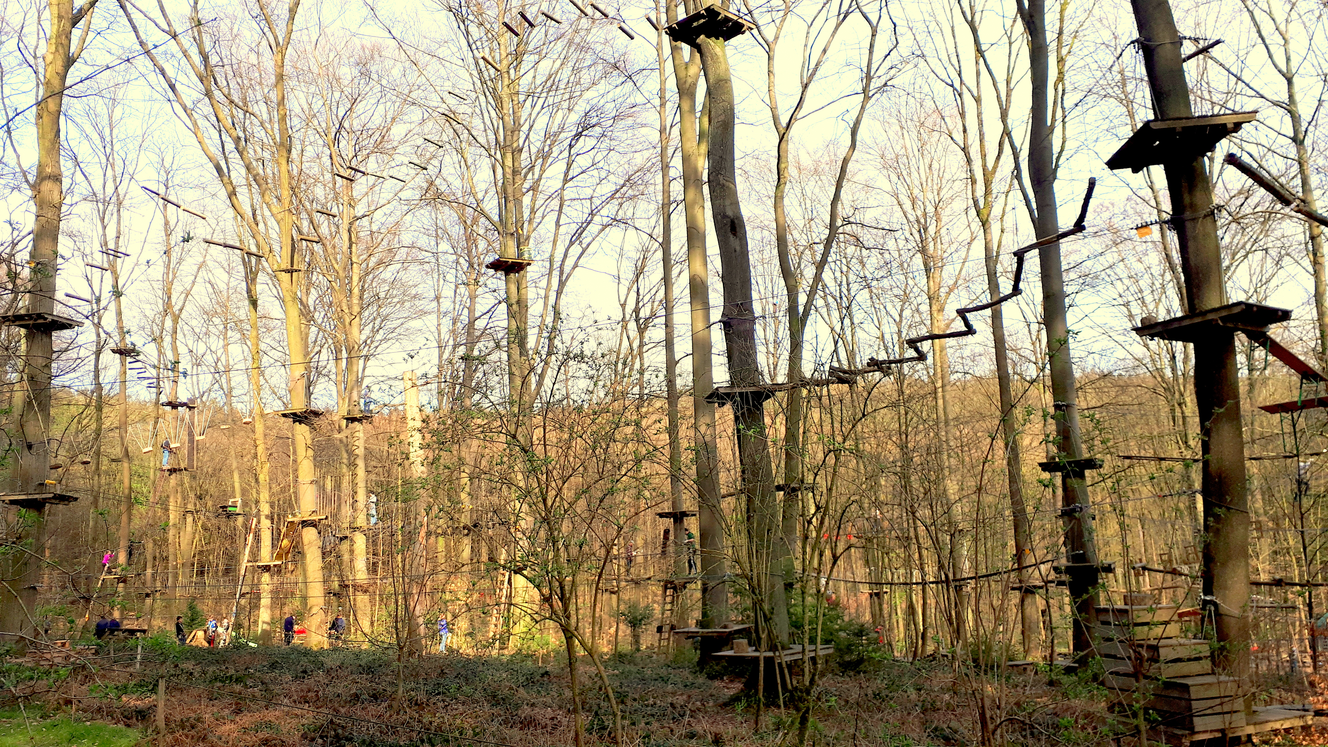 Kletterwald im Aachener Stadtwald